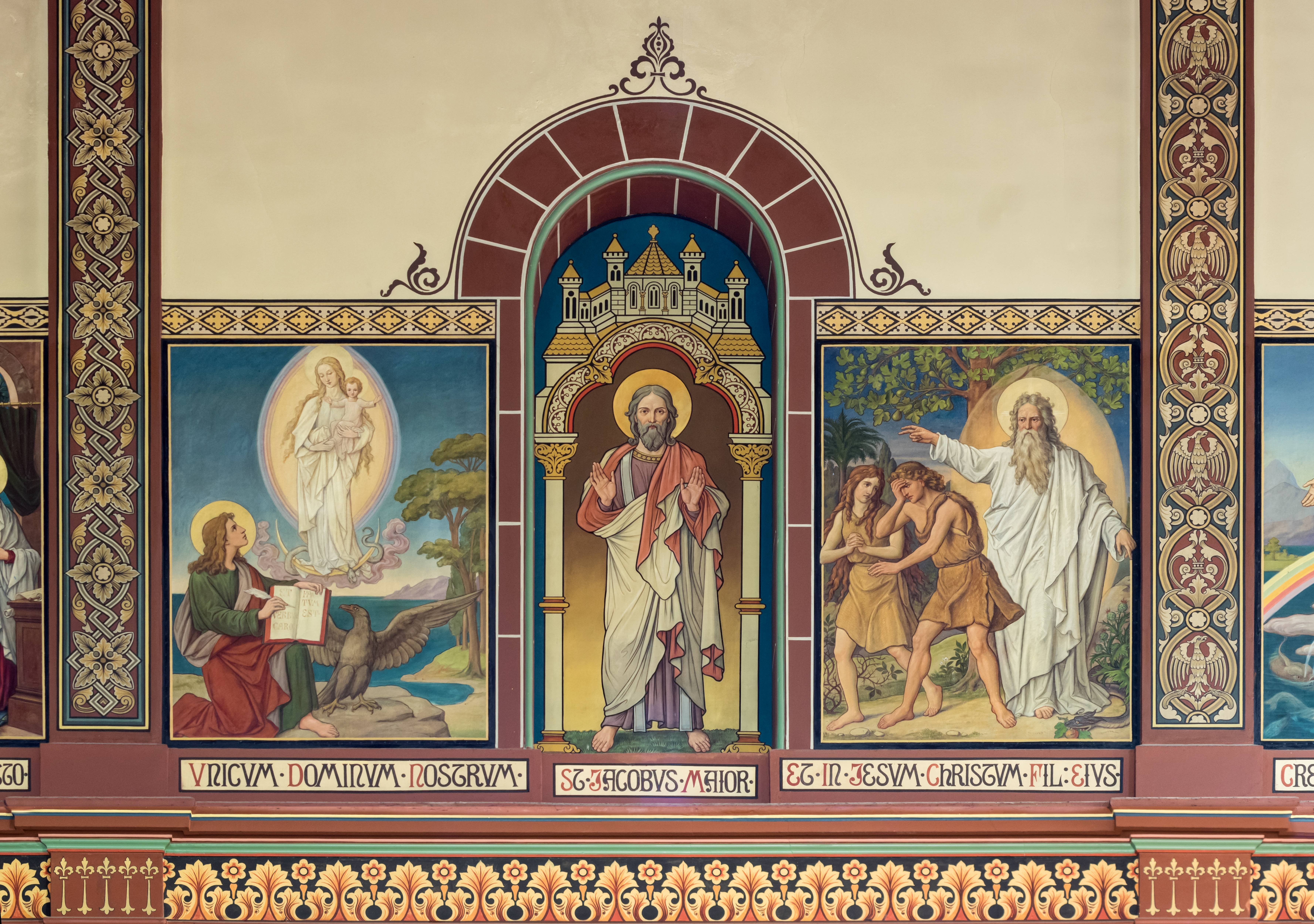 St. Peter und Paul in Bonndorf Das im Langhaus umlaufende Bilderband mit Statuen